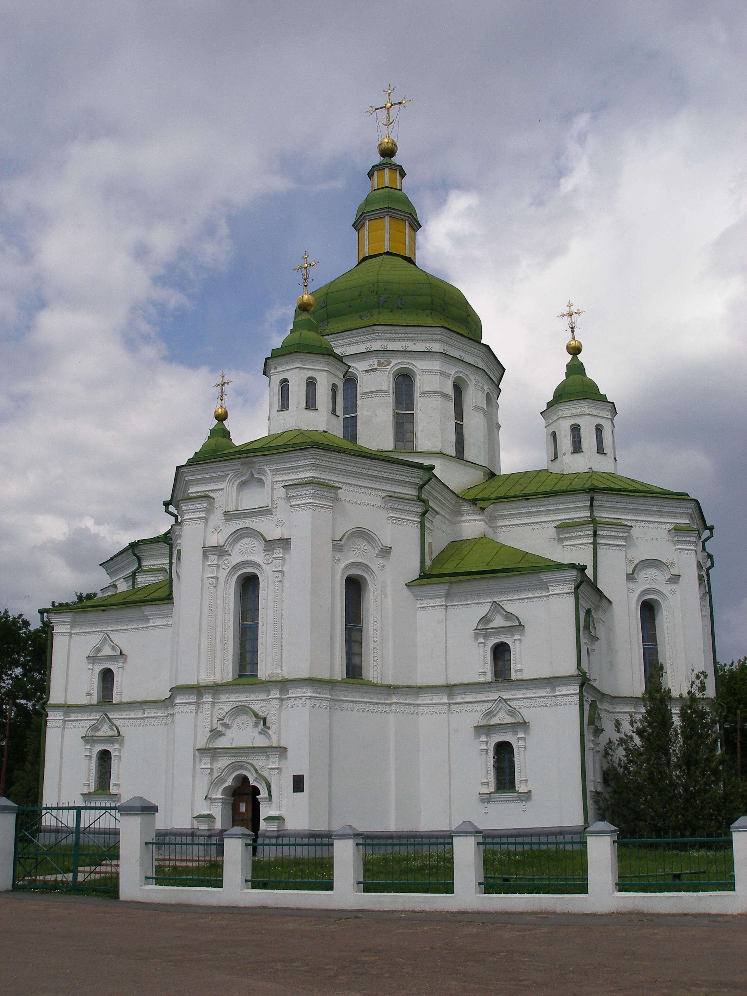 Спасо-Преображенська церква у Сорочинцях. Збудована гетьманом Д. Апостолом як усипальниця роду Апостолів